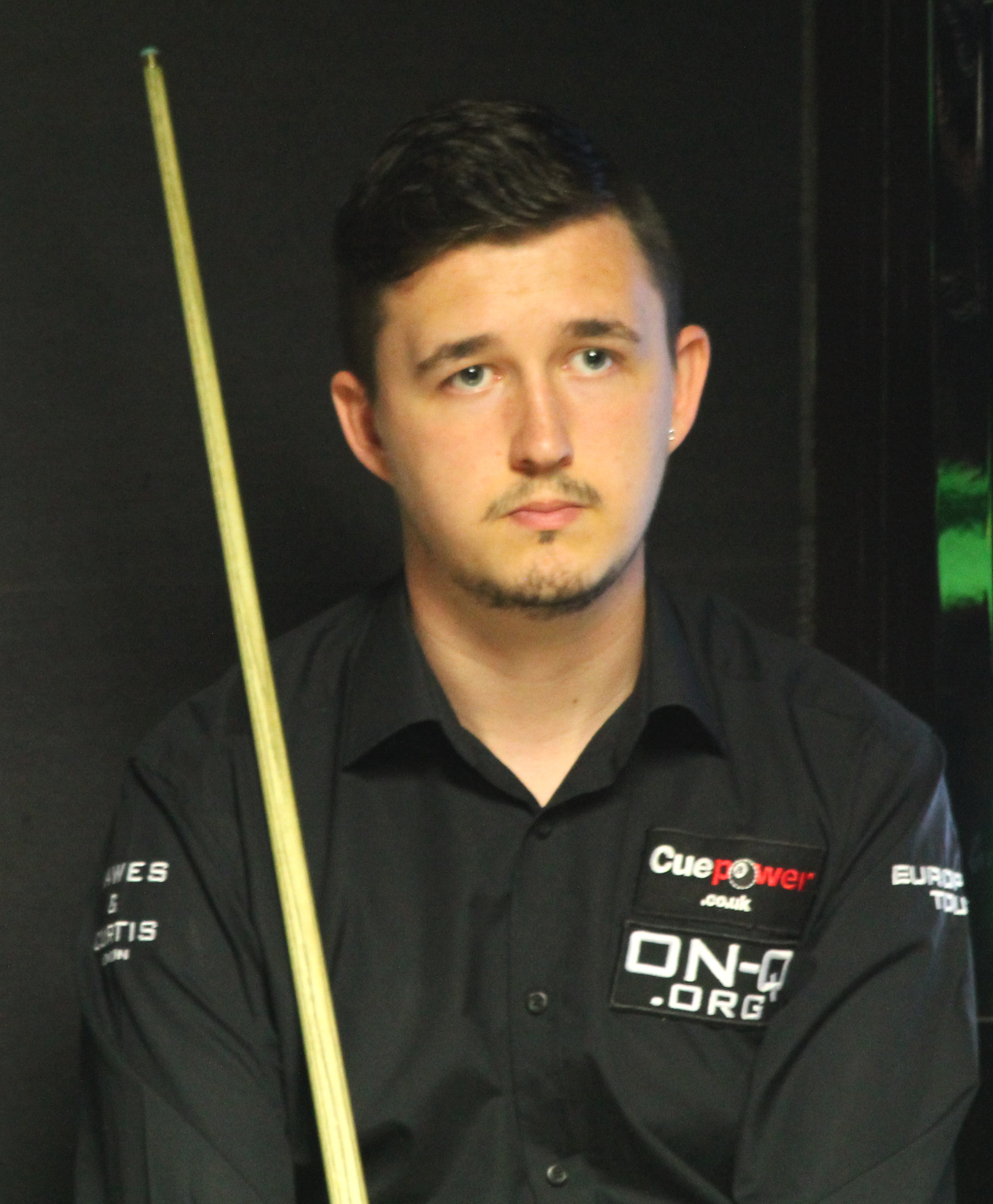 Kyren Wilson beim Paul Hunter Classic 2014